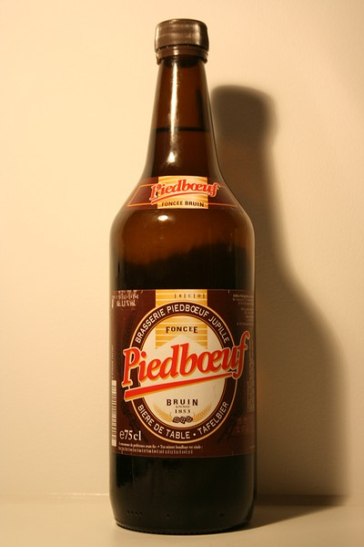 Piedbœuf Bruin